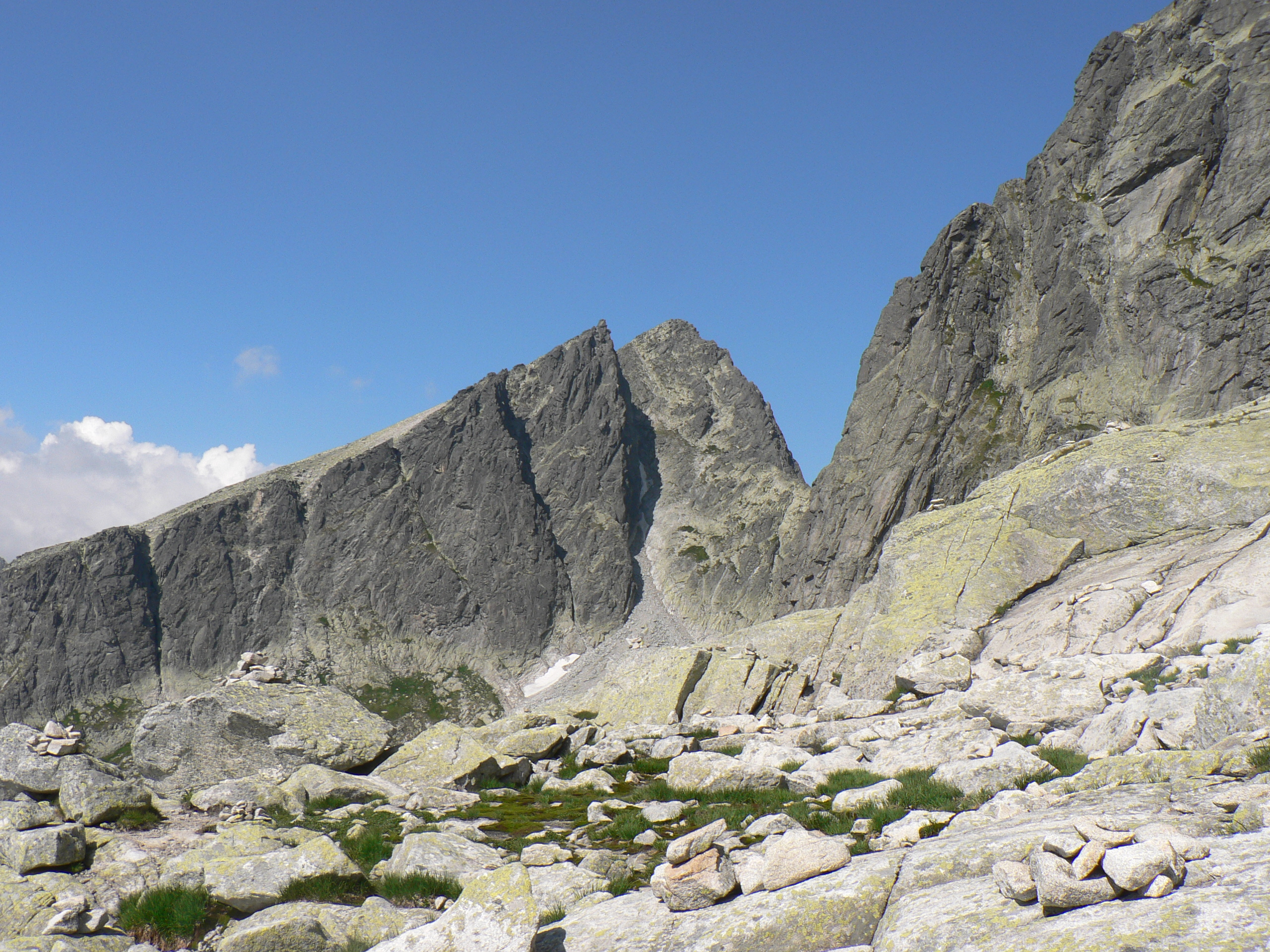 Jaworowy Szczyt ze szlaku z Czerwonej Ławki